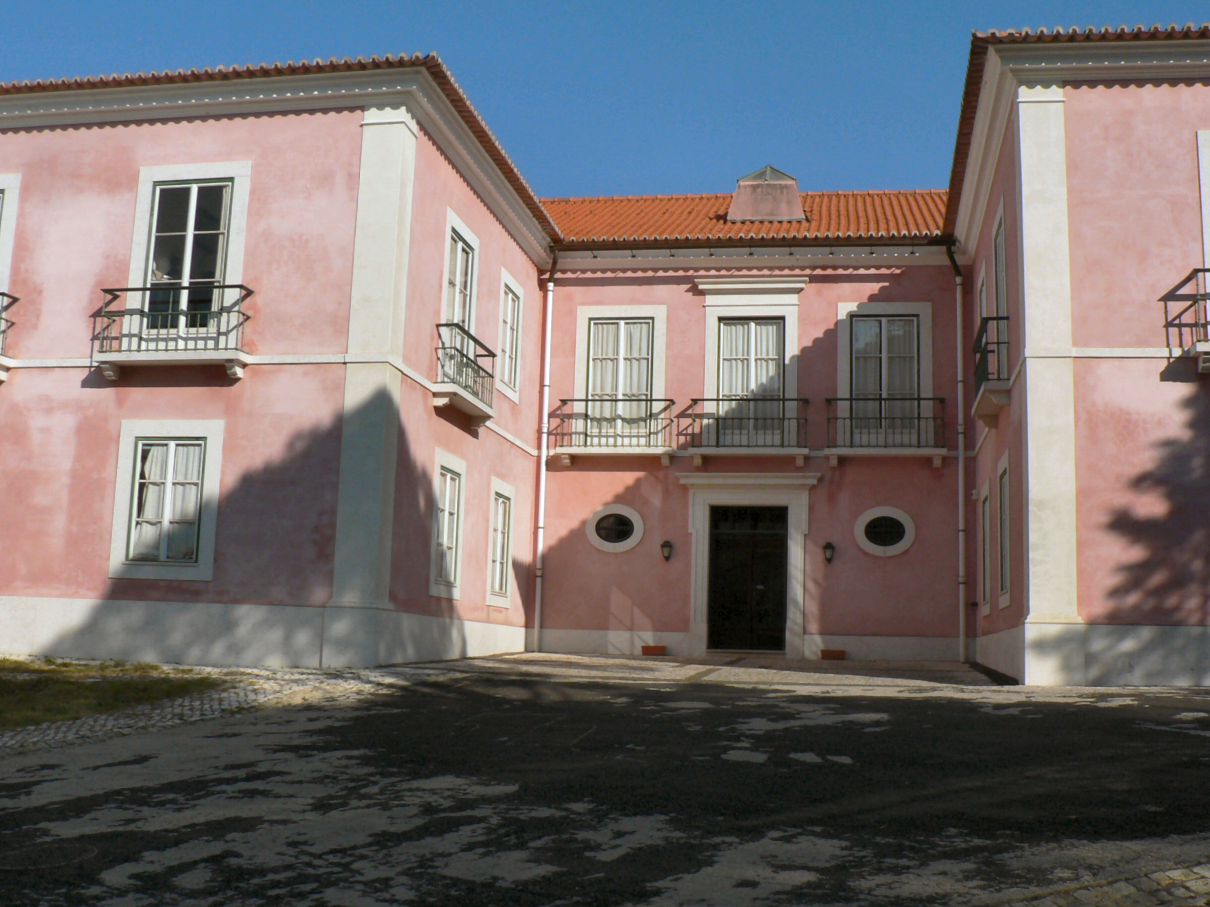 Museu do Cinema no Freixial, Bucelas